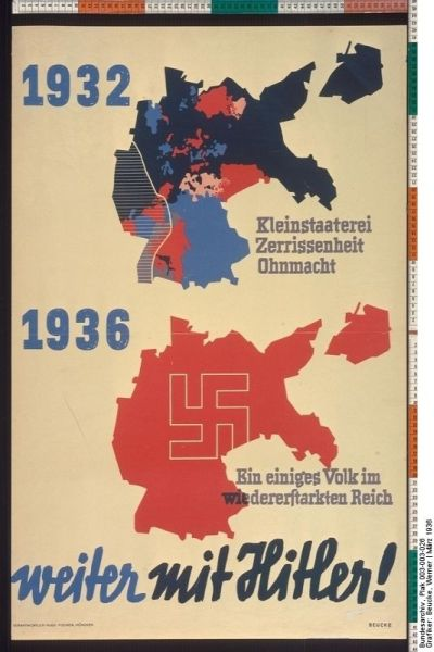 Wahlplakat Deutschland 1936 Text: 1932 Kleinstaaterei Zerrissenheit Ohnmacht 1936 Ein einiges Volk im wiedererstandenen Reich weiter mit Hitler!